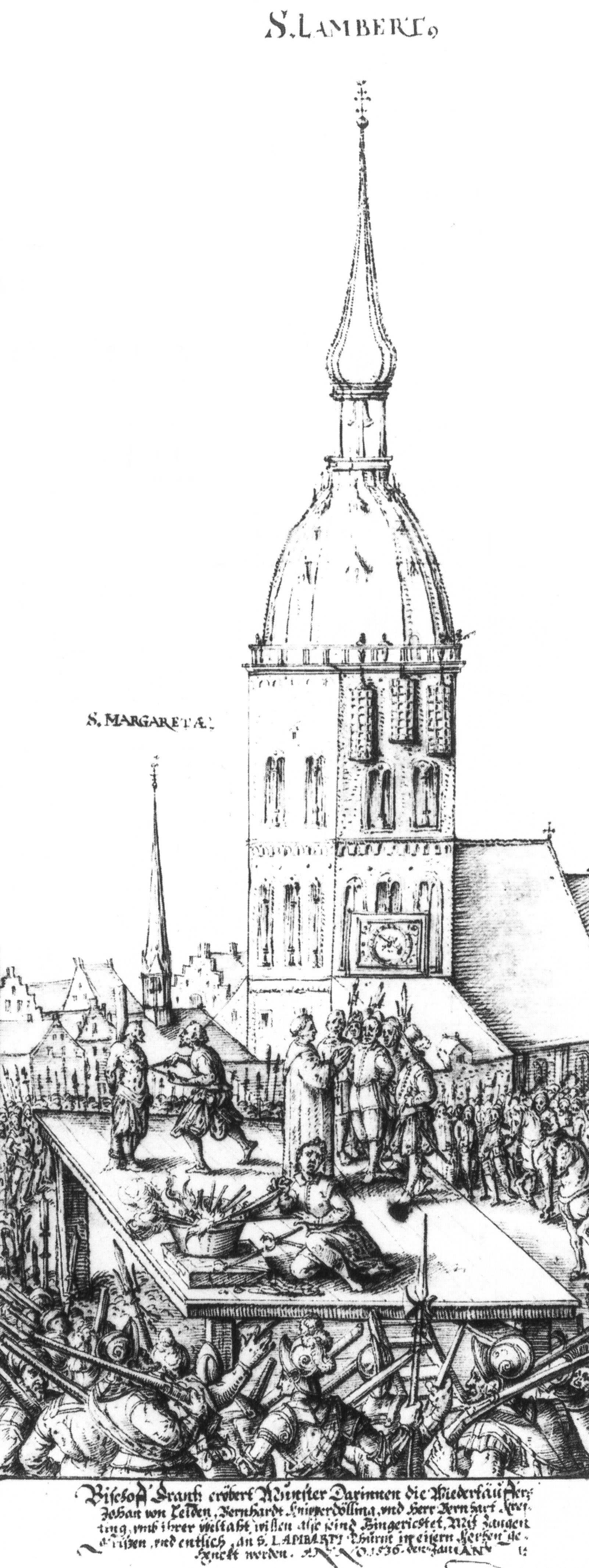 Historische Darstellung der Hinrichtung der Wiedertäufer auf dem Prinzipalmarkt von Münster, Westfalen